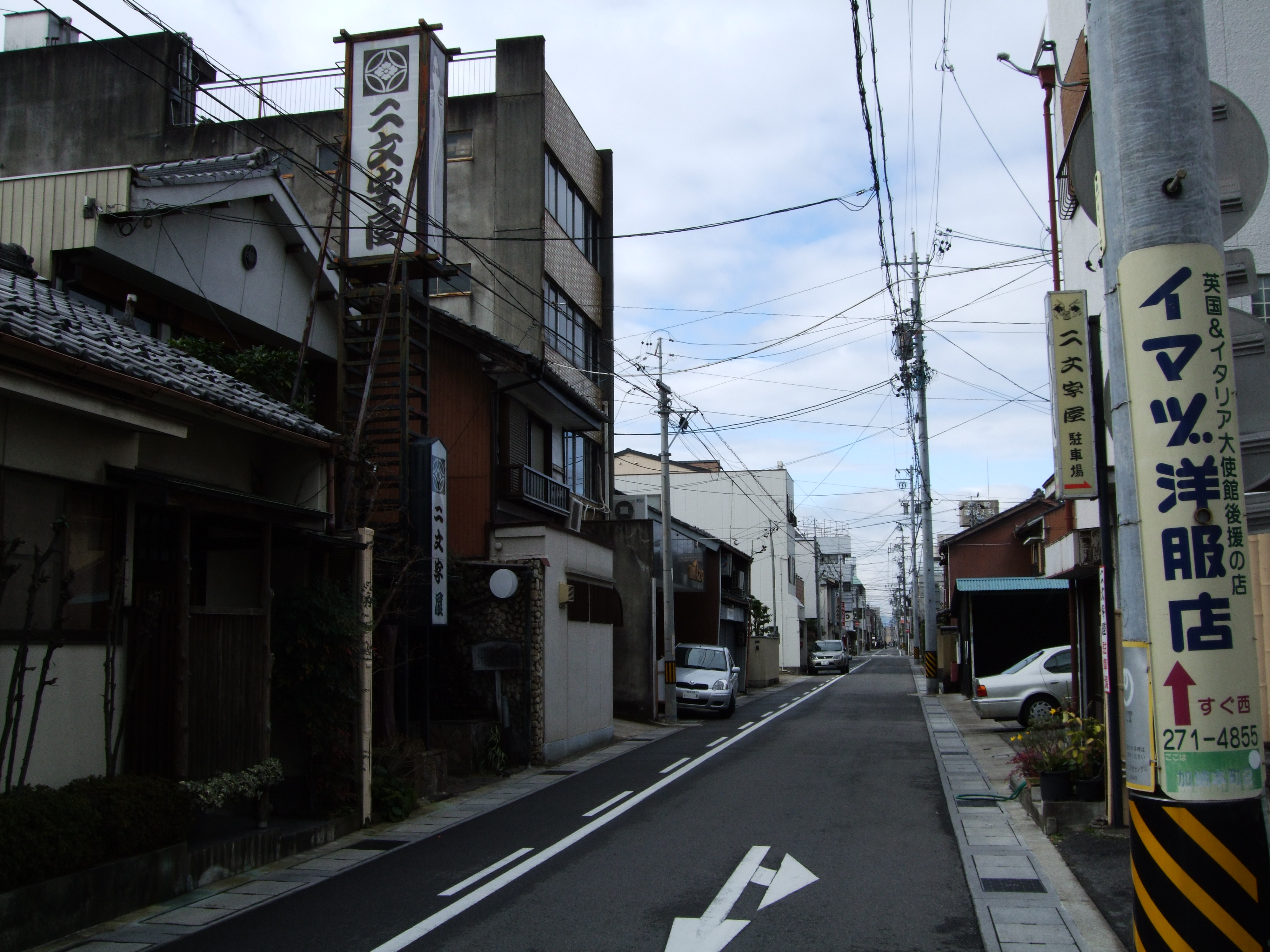 Kanojuku-Nakasendou (a national road in Edo period)in Japan